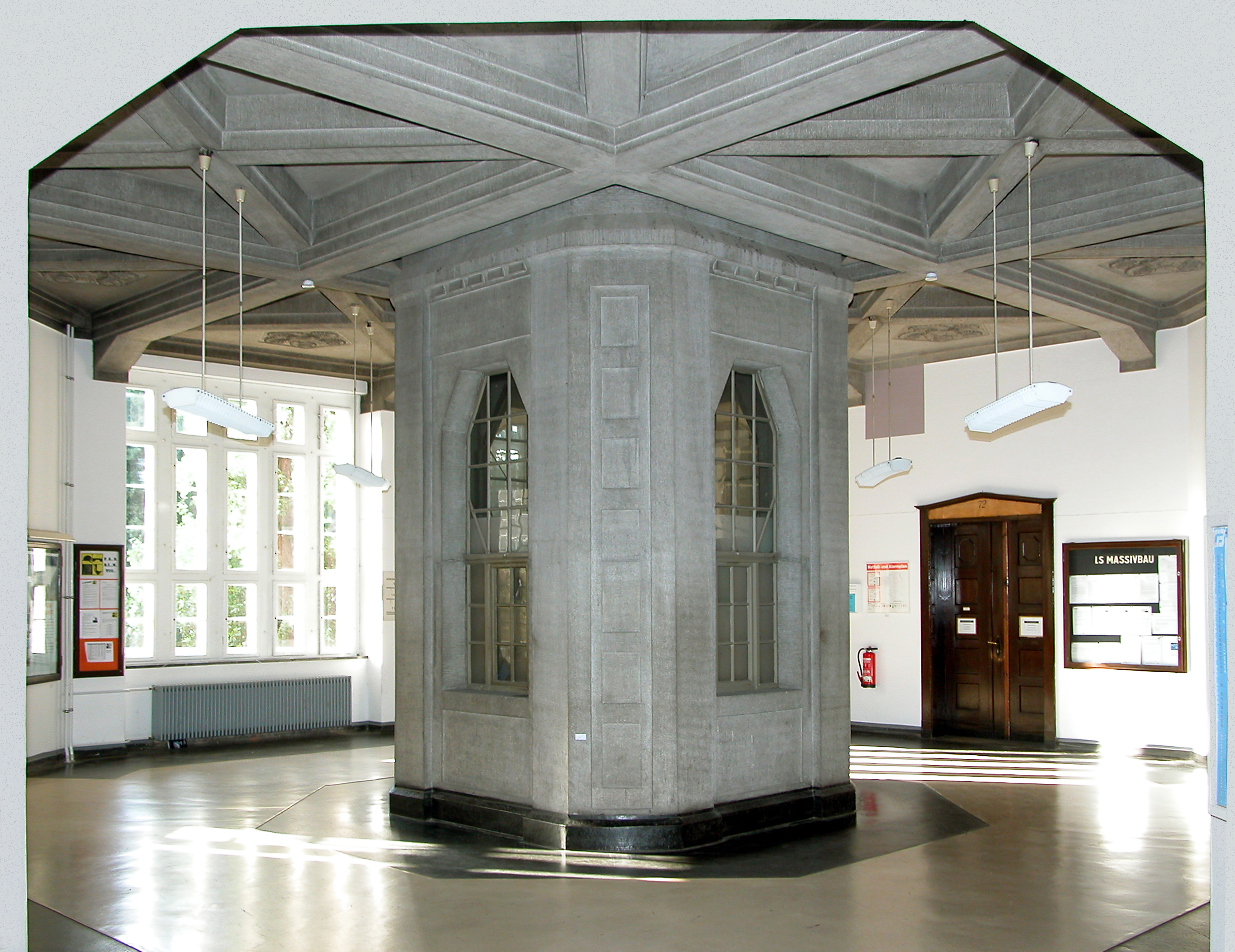 20.07.2009 01069 Dresden-Südvorstadt, George-Bähr-Straße 1 (GMP: 51.029752,13.729214): Beyer-Bau der TU Dresden. 1910-1913 nach Plänen des Architekten Martin Dülfer erbaut und 1953 nach dem Bauingenieur Kurt Beyer benannt. Haupteingang. [DSCN38227.TIF]20090720070DR.JPG(c)Blobelt